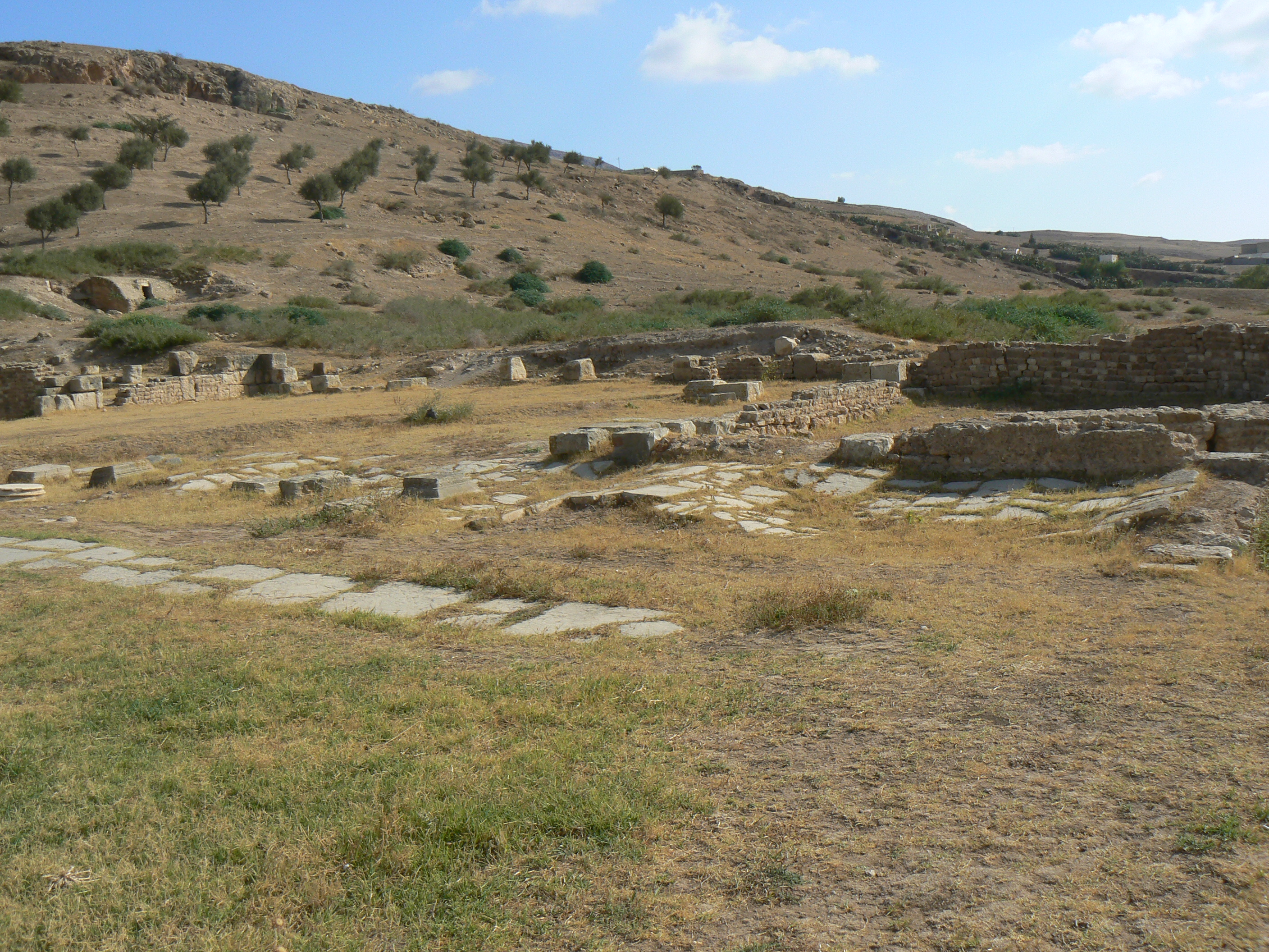 Forum de Bulla Regia, vue vers basilique